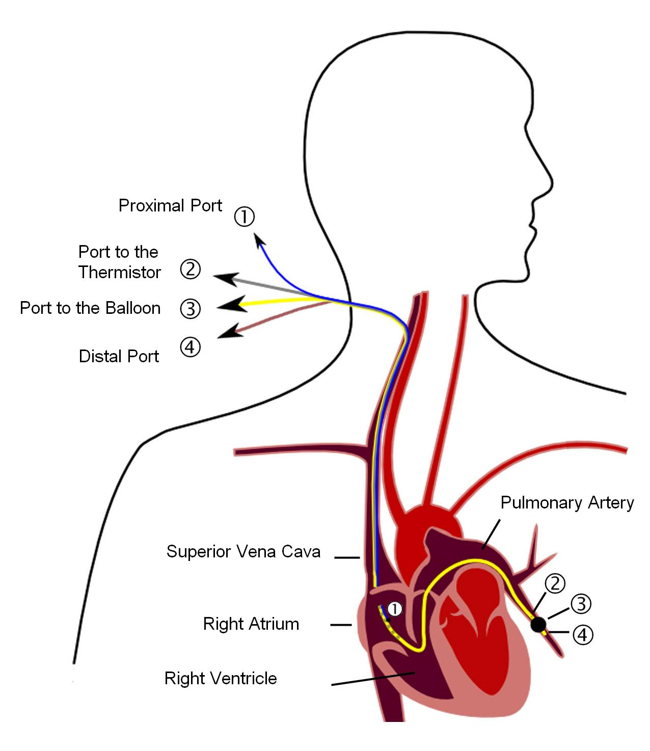 Schéma zavedení Swanova-Ganzova katétru v angličtině